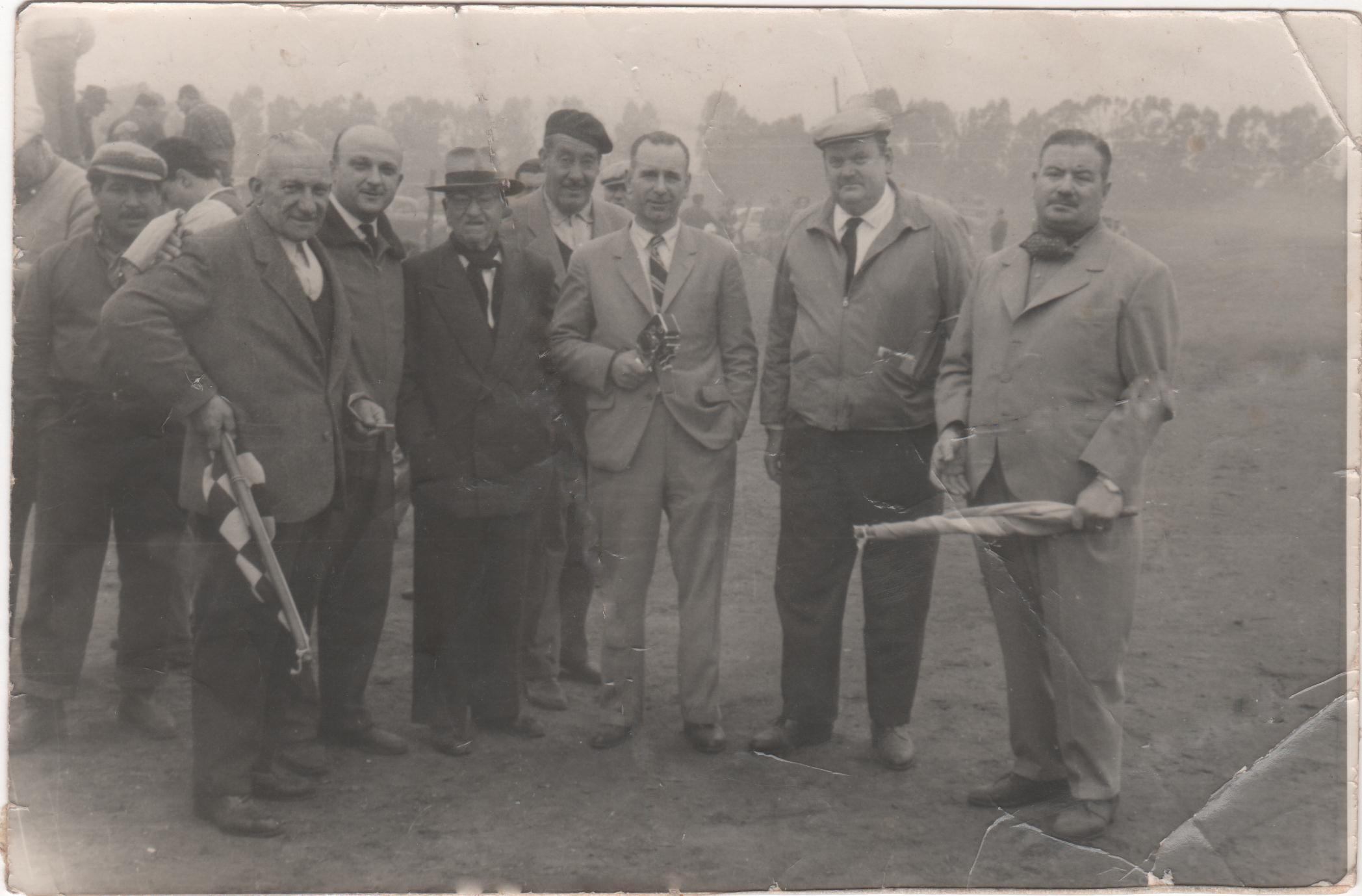 La foto corresponte a la Clasificación de la primera vuelta del Turismo Carretera en el circuito de tierra del actual Autodromo de la Ciudad de 9 de Julio. Provincia de Bs As. De Izquierda a Derecha: Con Bandera a Cuadros Juan Jose Plini, Gildo Pesaressi, Arturo Michelini, Prof. Fernandez, Emilio Bengoa, Dr. Gassman y Con Bandera Argentina Agrim. Luis Tomas Mondelli. Integrantes de la primer Comisión Organizadora.